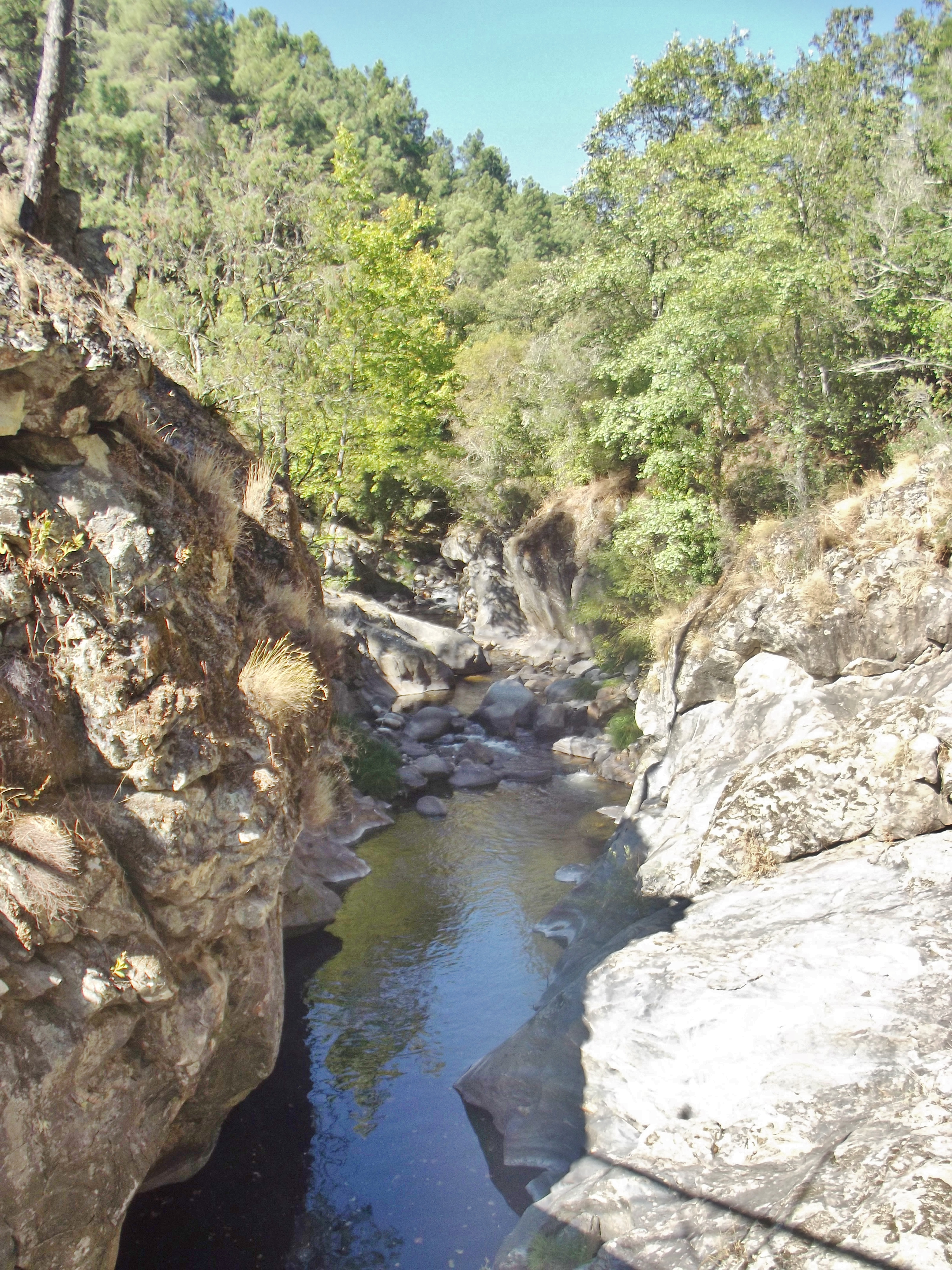 Río Arenal, Arenas de San Pedro.